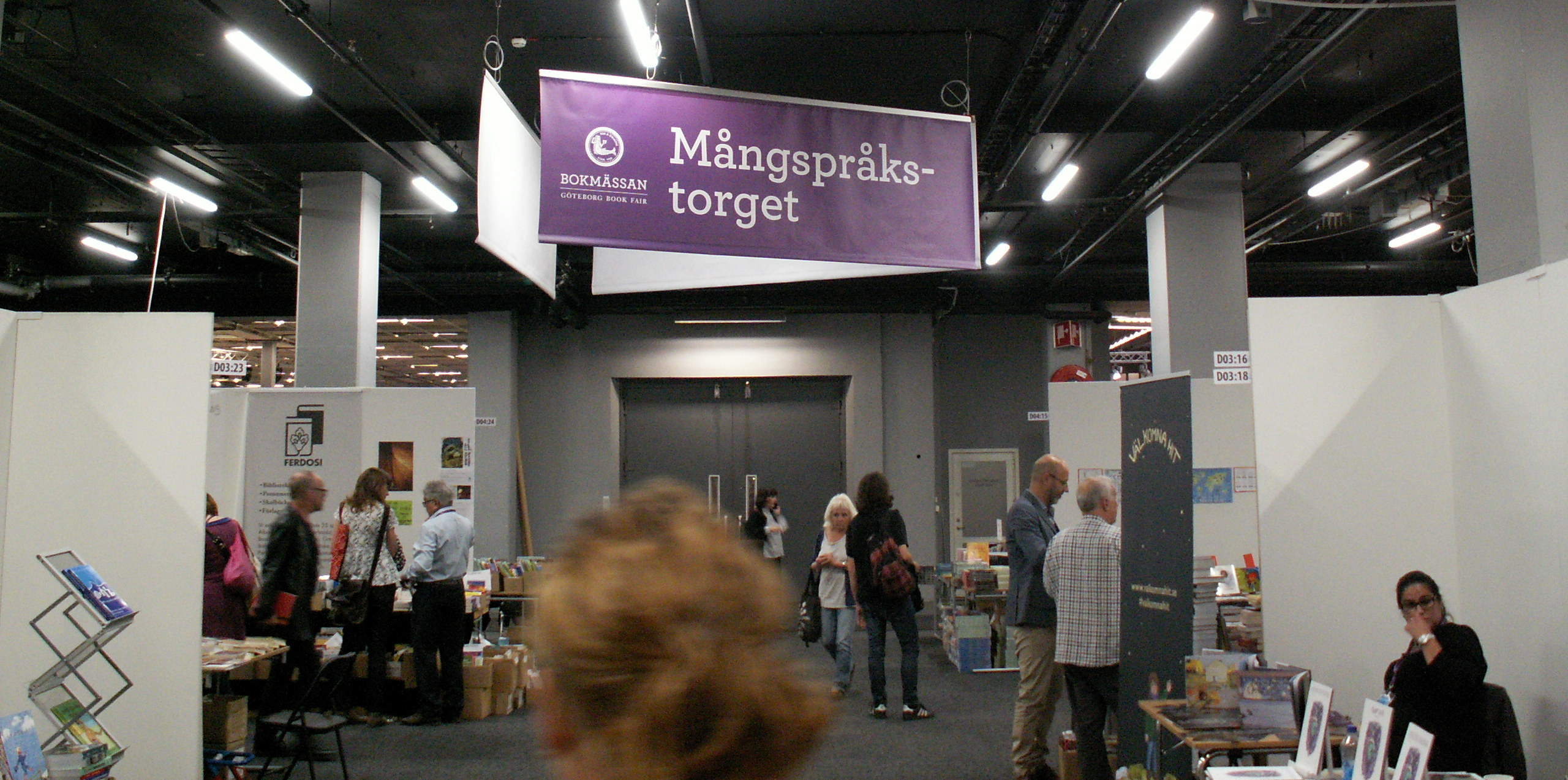 Mångspråkstorget, på Bokmässan i Göteborg 2016.